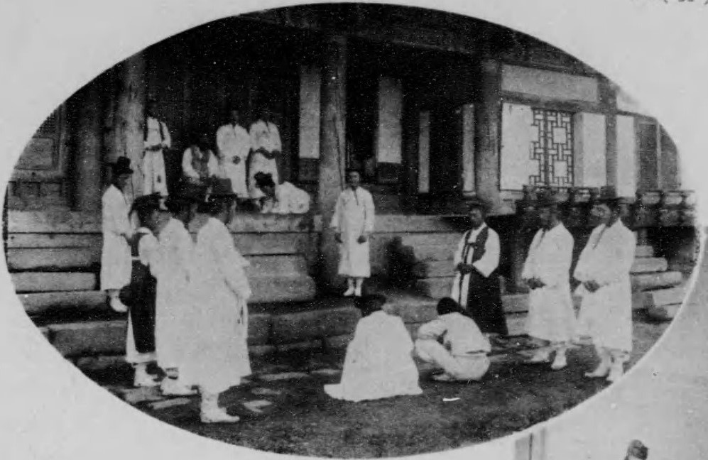 李氏朝鮮時代の裁判風景 朝鮮写真帖 (朝鮮総督府, 1921)